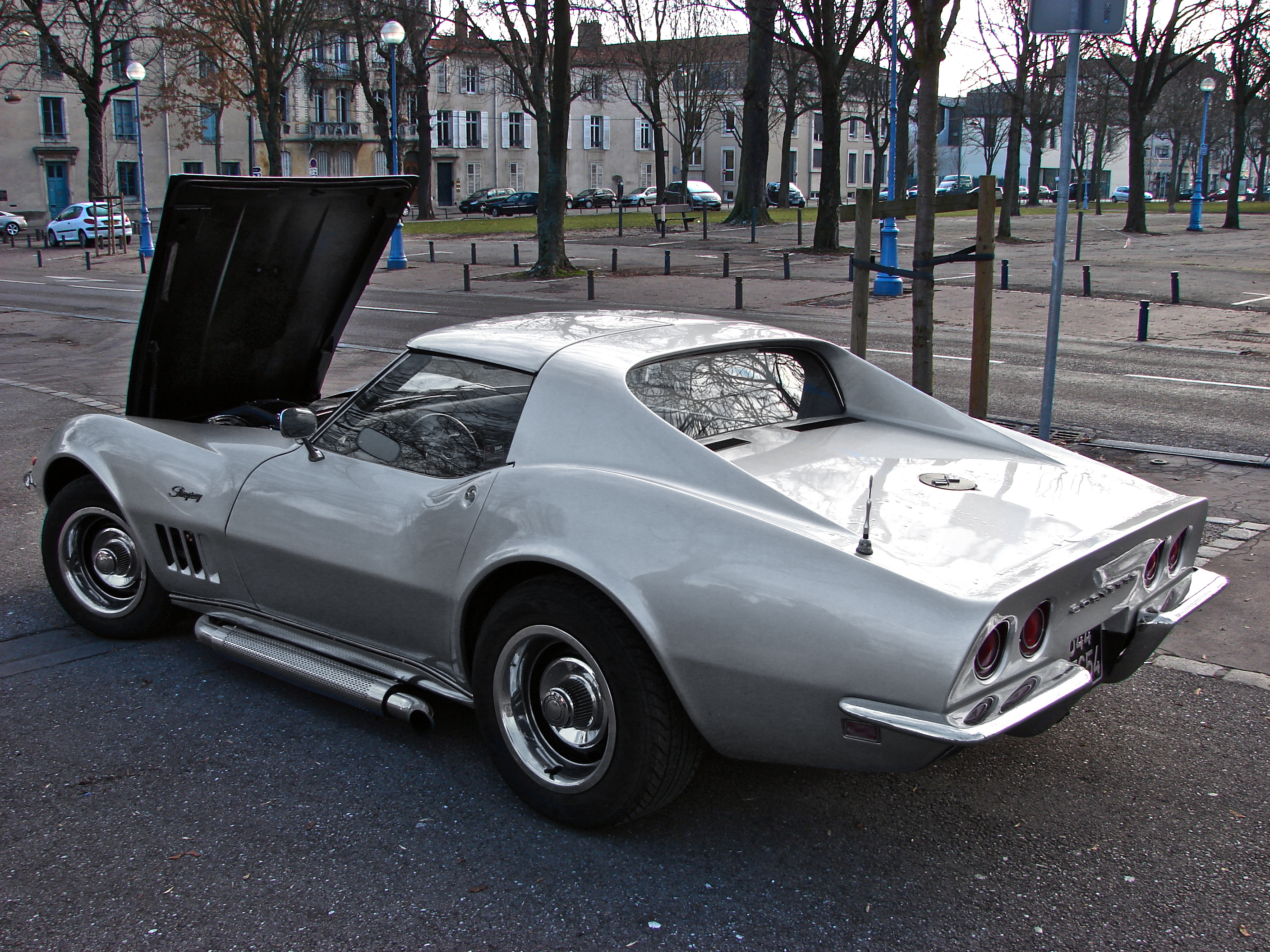 Chevrolet Corvette C3 Stingray